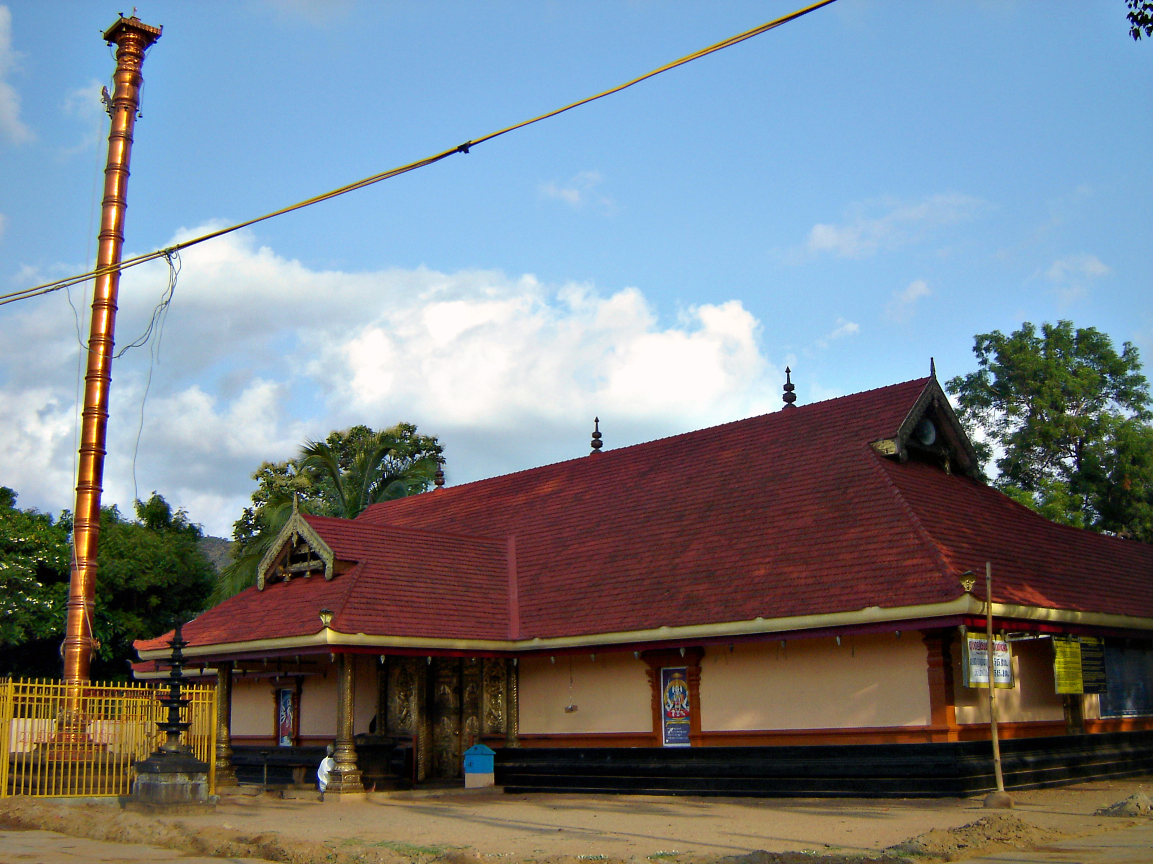 Nellikkulangara Bhagavathi Temple, Nemmara, Palakkad, Kerala, India